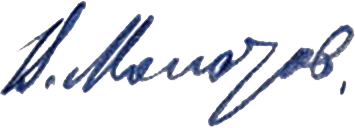 Роспись Вячеслава Михайловича Молотова